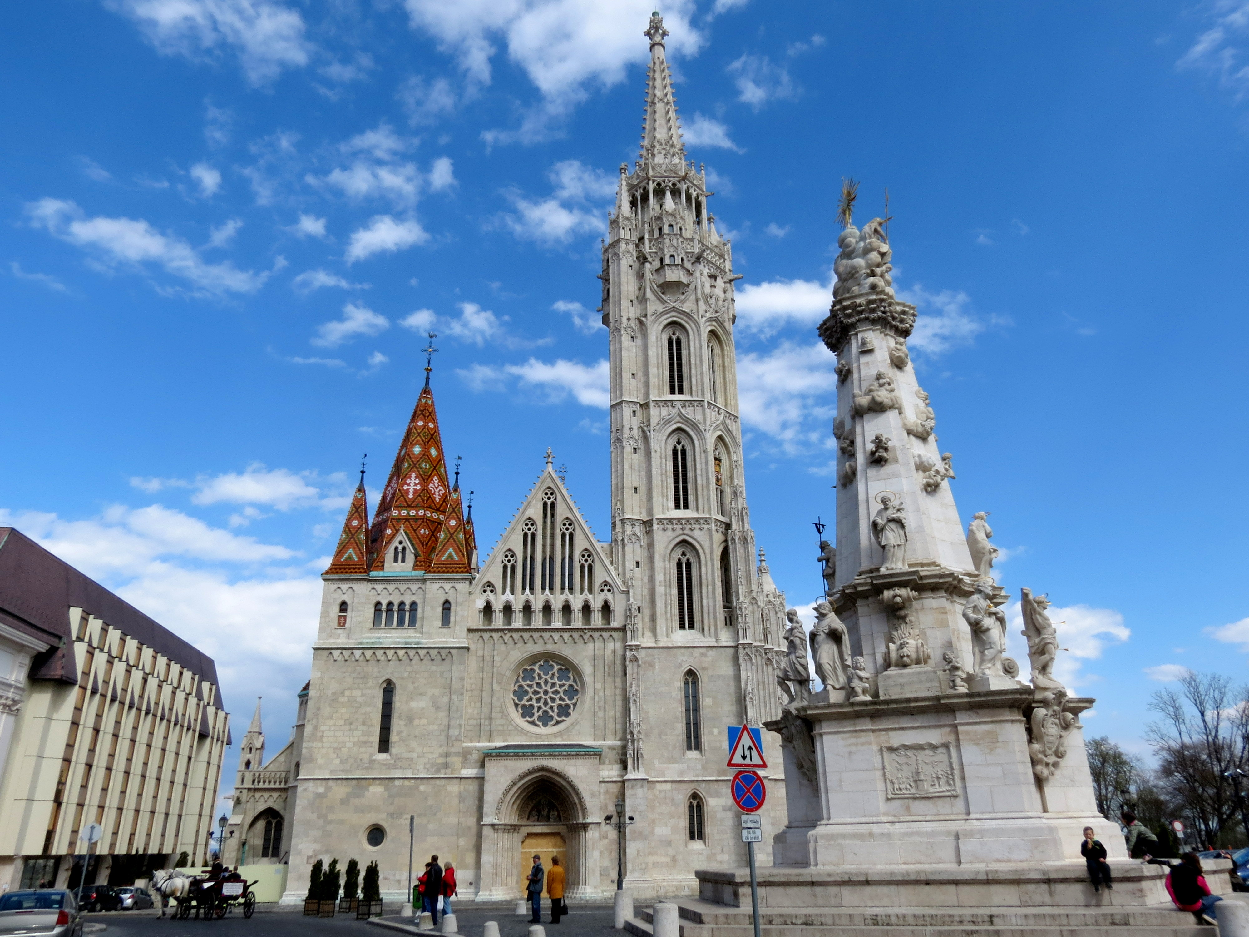 Vue de Budapest.